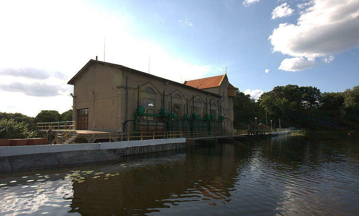 Budynek elektrowni od strony górnej wody, czyli Zalewu Bledzewskiego.